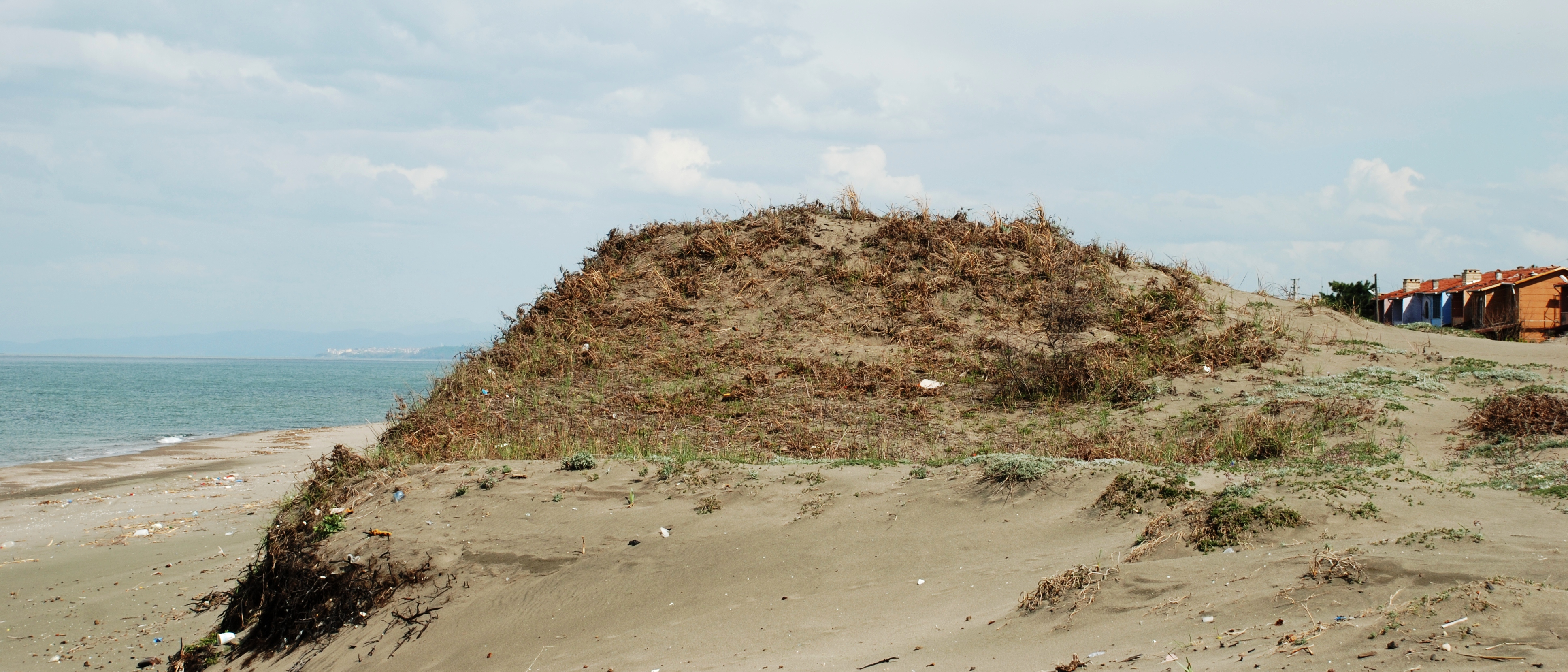 Sakarya Deltasının doğusunda, Kocaali sahilinde, kıyı kumulları. Bol yağışlı bölgede topraksız kum üzerinde bitki örtüsü oluşmuştur.